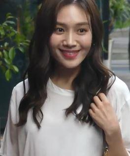 3일 오후 서울시 영등포구 여의도의 한 음식점에서 OCN 오리지널 '미스트리스'의 종방연이 열렸다.